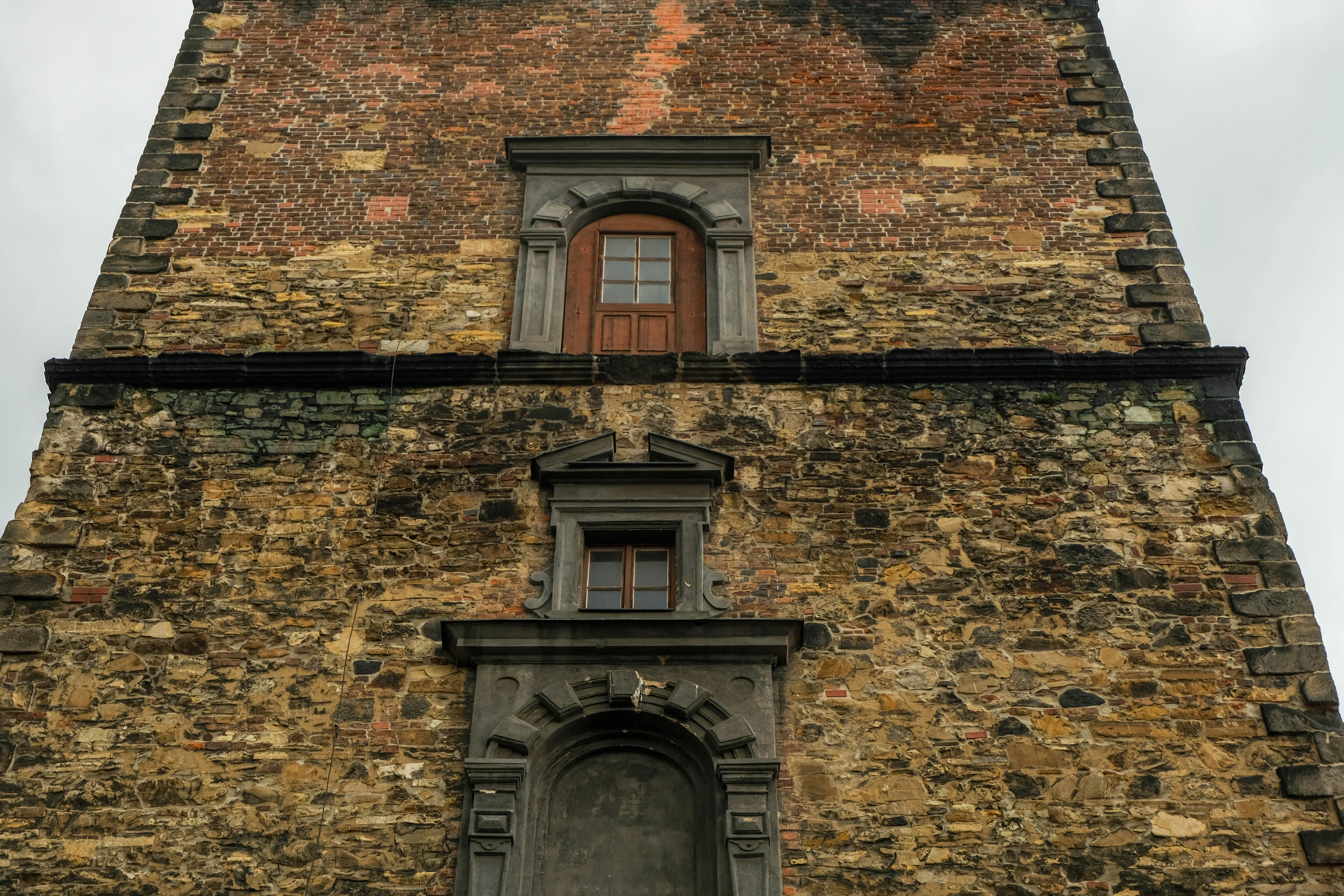 kostelní věž